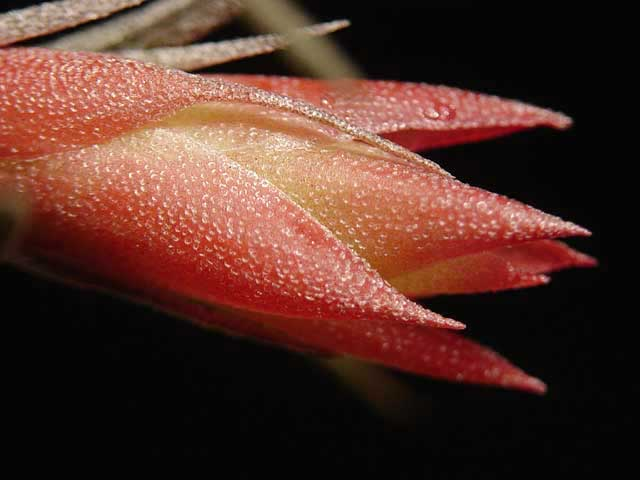 Tillandsia Kautskyi Bract